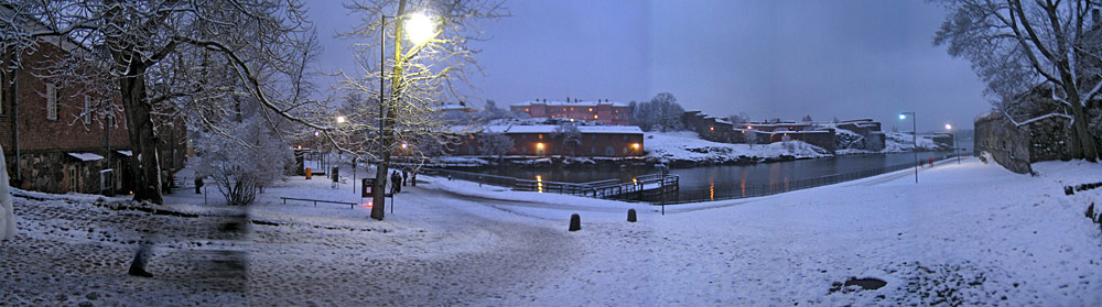 Nachmittags auf der Festungsinsel Suomenlinna, Helsinki, Finnland.